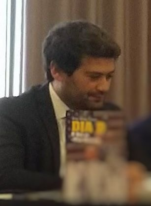 Lançamento do Livro de João Lemos Esteves - Dia D, o dia de “The Donald”, sobre a eleição do Presidente Americano Donald Trump.